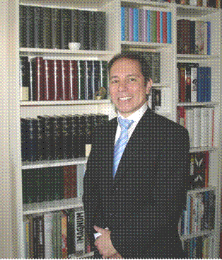 Marcelo Osvaldo Martínez, de nacionalidad argentina, diseñador gráfico, ilustrador, comunicador, investigador y escritor, radicado en Madrid (España) desde el año 2000